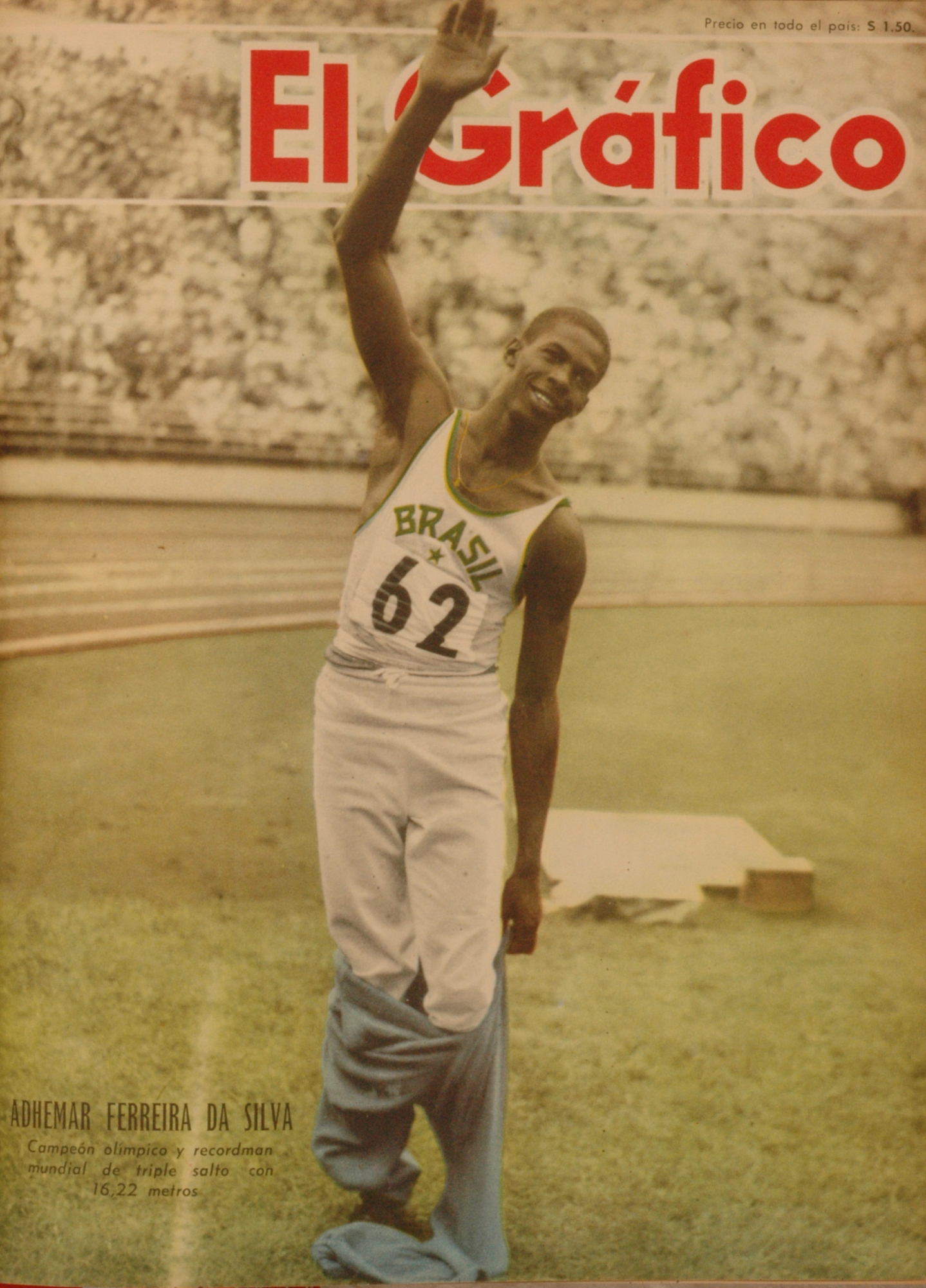 El Grafico del 05 de Septiembre de 1952. Edicion 1726